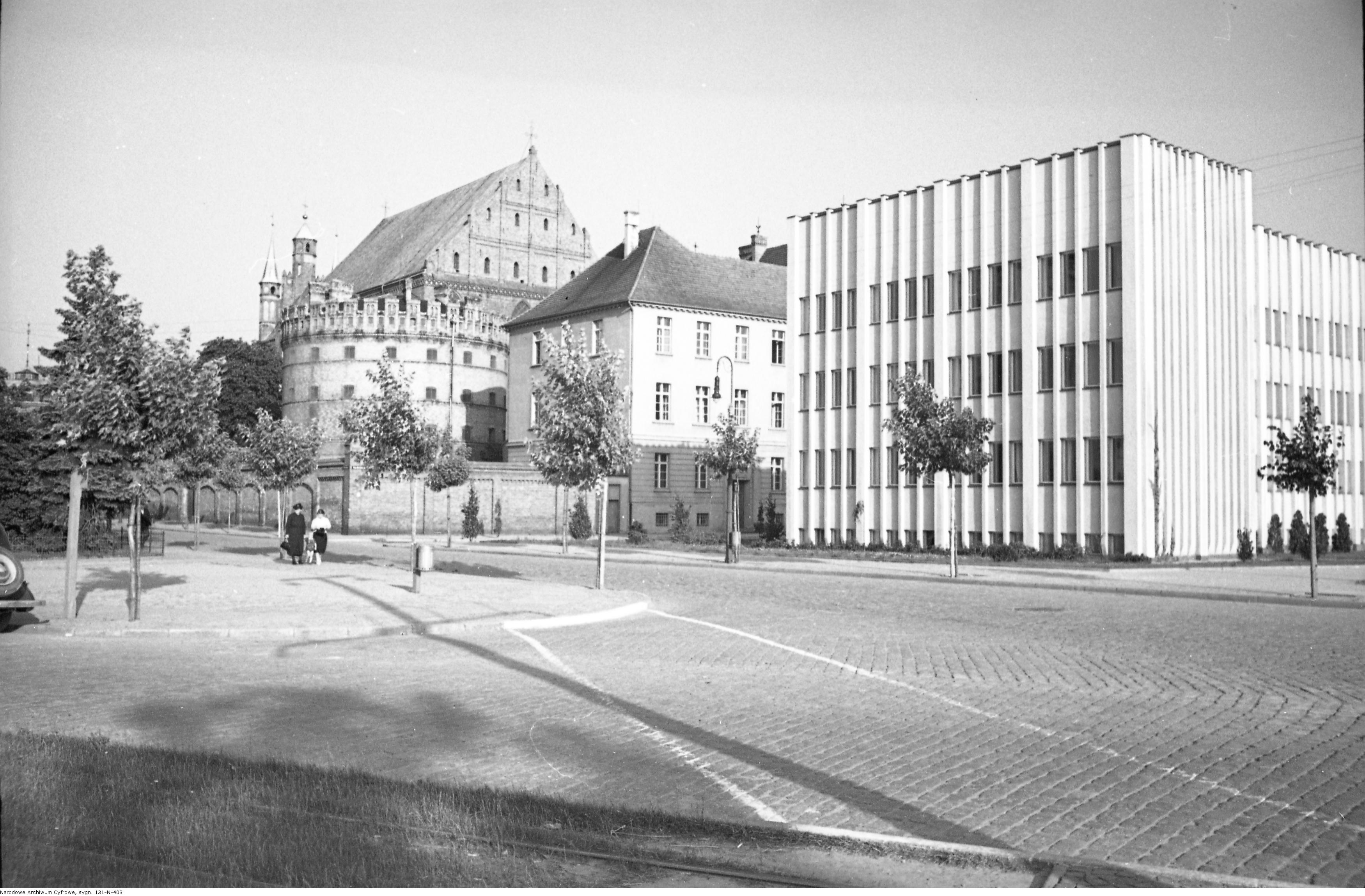 [Fragment miasta.]